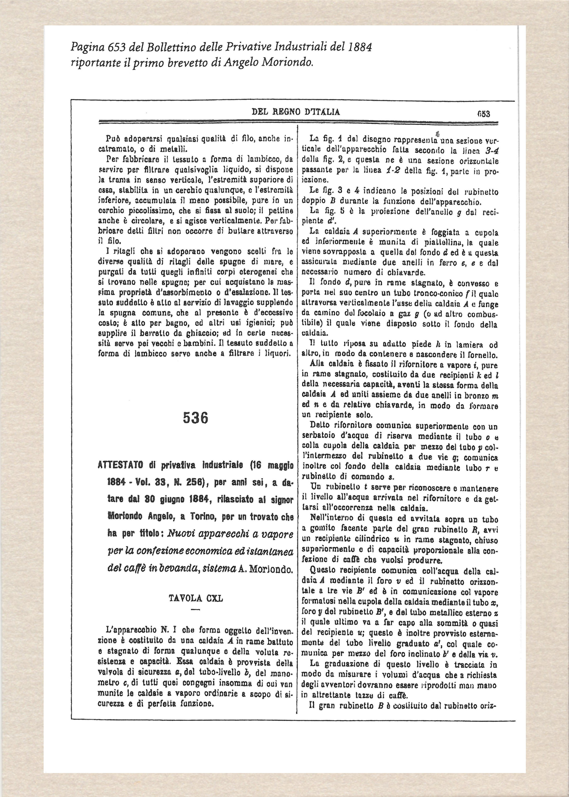 Progetto tecnico presentato all'ufficio Brevetti